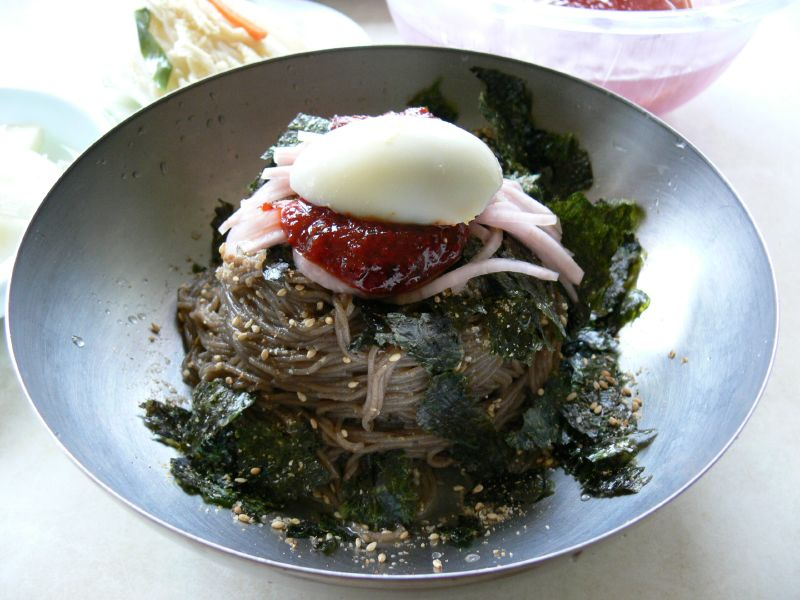 막국수, Makguksu, マッククス